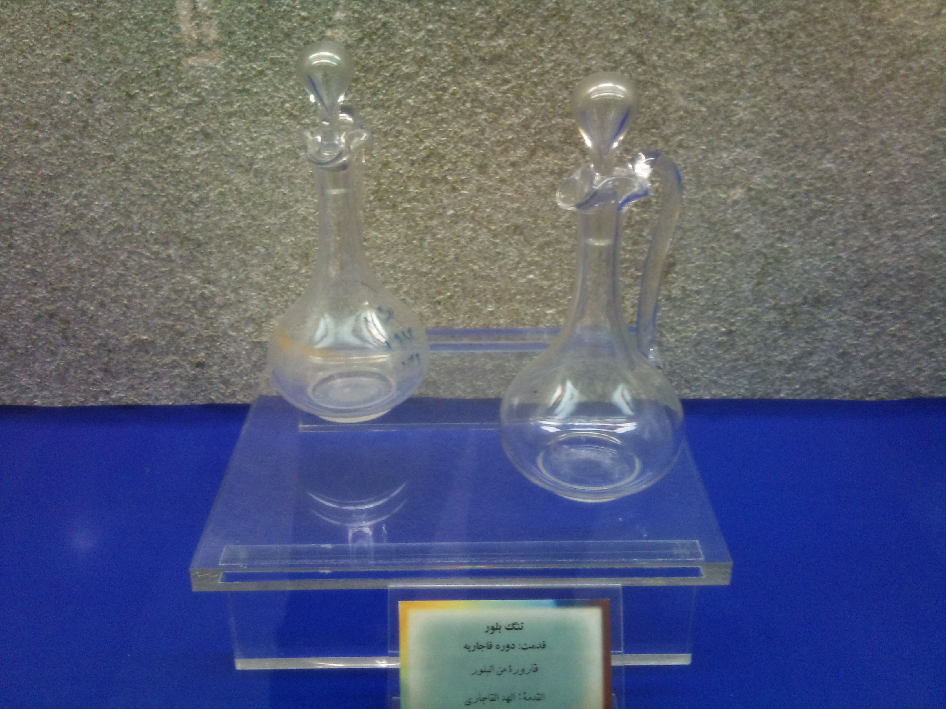 Mashhad museum